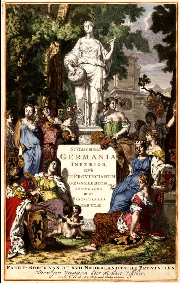 title=Germania Inferior, Sive XVII Provinciarum;size=41x26cm